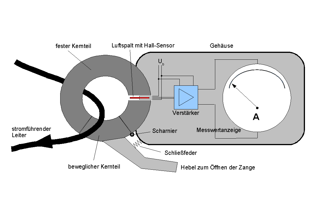 Allstrom-Zangenamperemeter